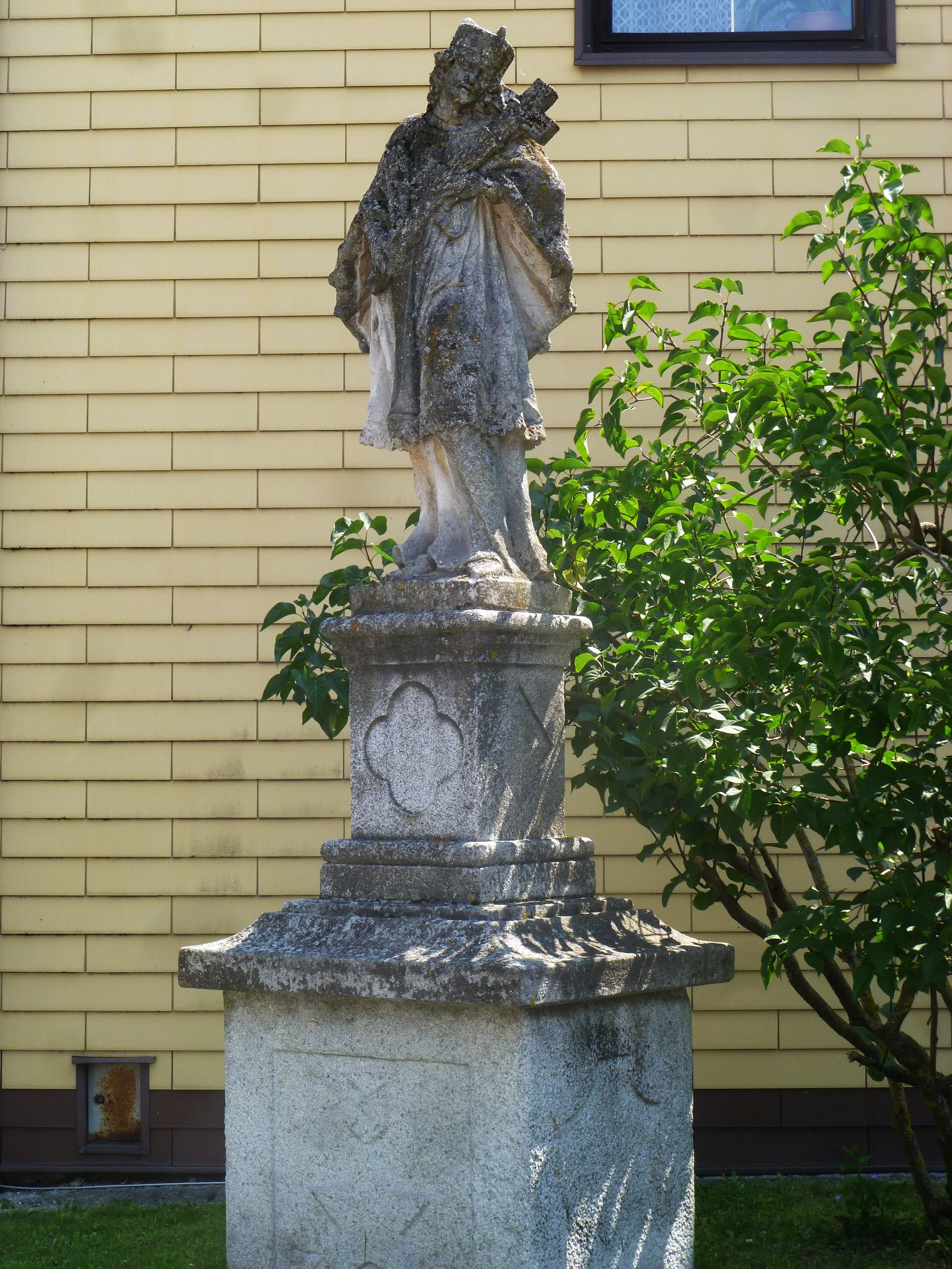 Figurenbildstock hl. Johannes Nepomuk